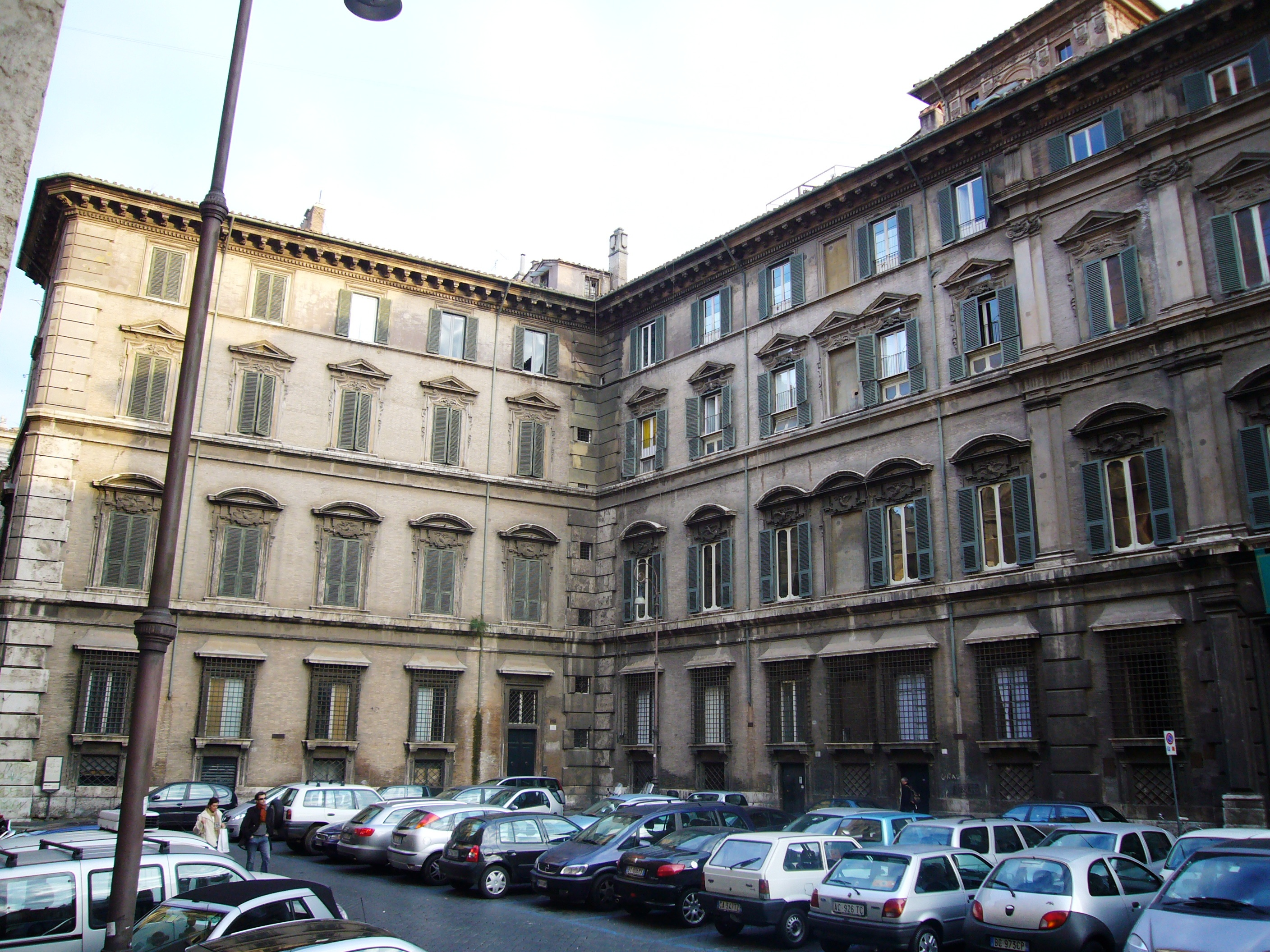 Roma, rione Pigna: piazza del Collegio romano e palazzo Doria Pamphili